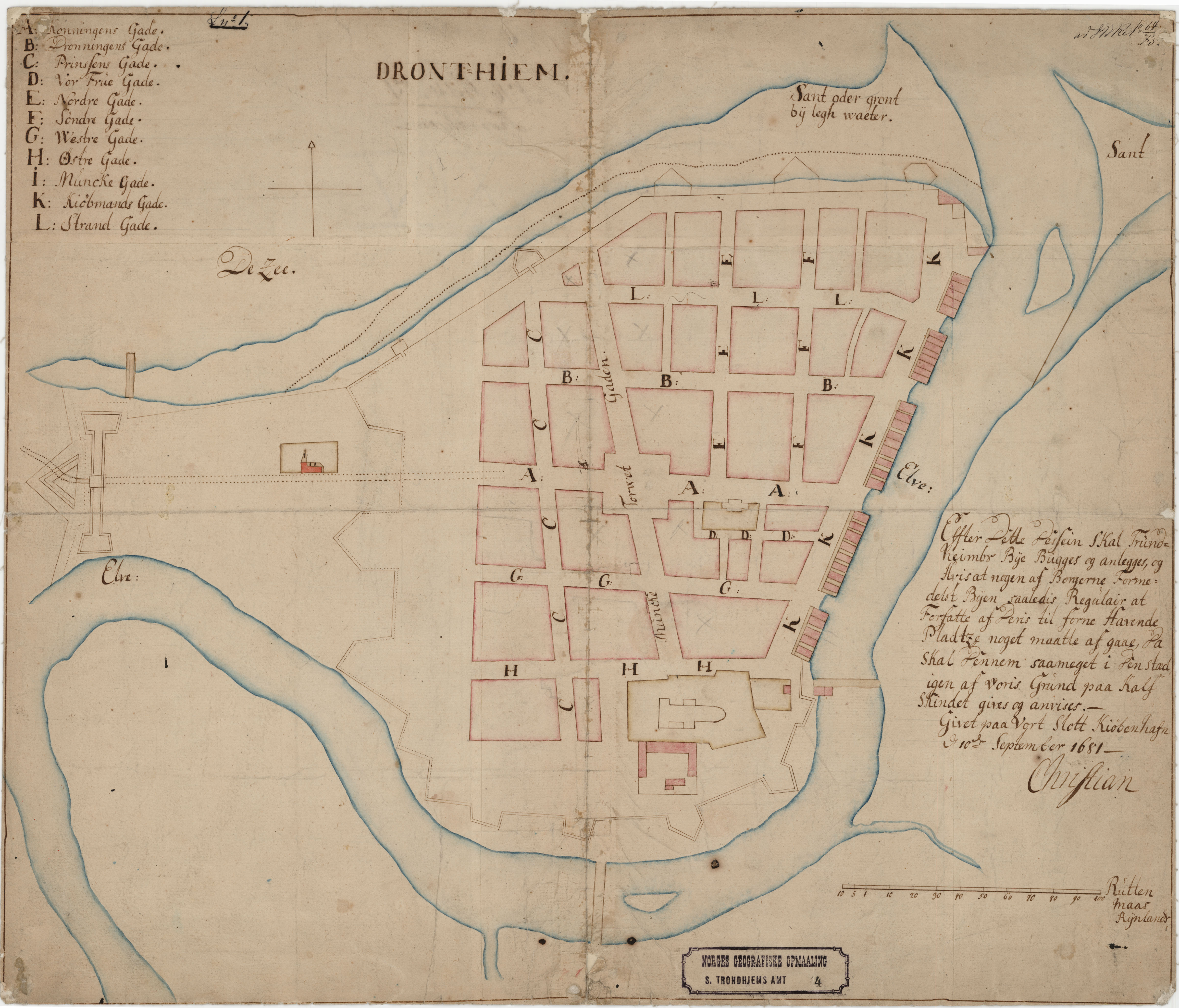 Drontheim. En ny Reguleringsplan; approberet af Kong Christian. København 10. september 1681: Approbationen er sålydende: Effter Dette Dessein Skal Trund-Heimbs Bye Bugges og anlægges; og Hvisat nogen af Borgerne Formedelst Byen saaledis Regulair at Forfatte af Deris till forne havende Pladtze nogen maatte afgaae; Da skal Dennem saa meget i den stæd igien af voris Grund paa Kalf Skindet gives og andvises.